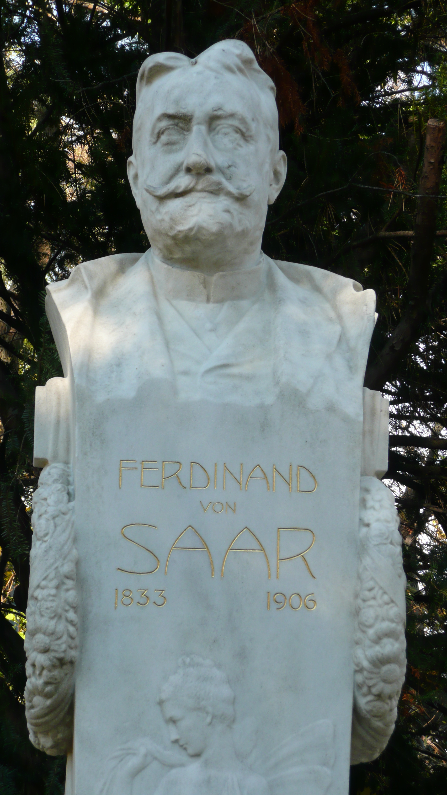 Ferdinand von Saar, 1833-1906, österreichischer Schriftsteller, Denkmal im Wertheimsteinpark von Wien, Bildhauer: Franz Seifert, 1914.